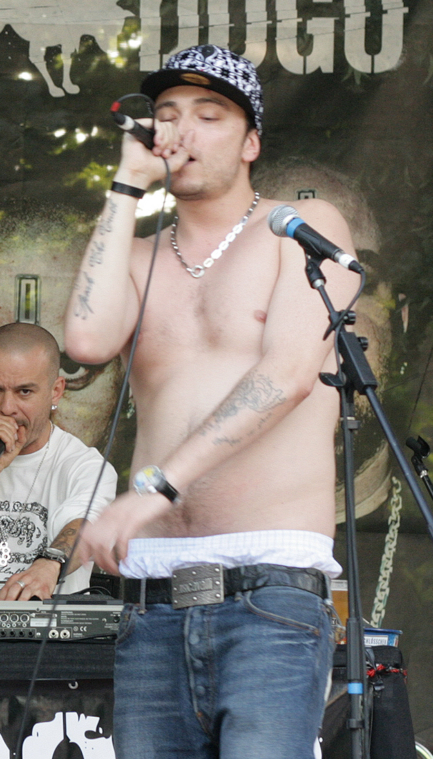 Il rapper italiano Guè Pequeno